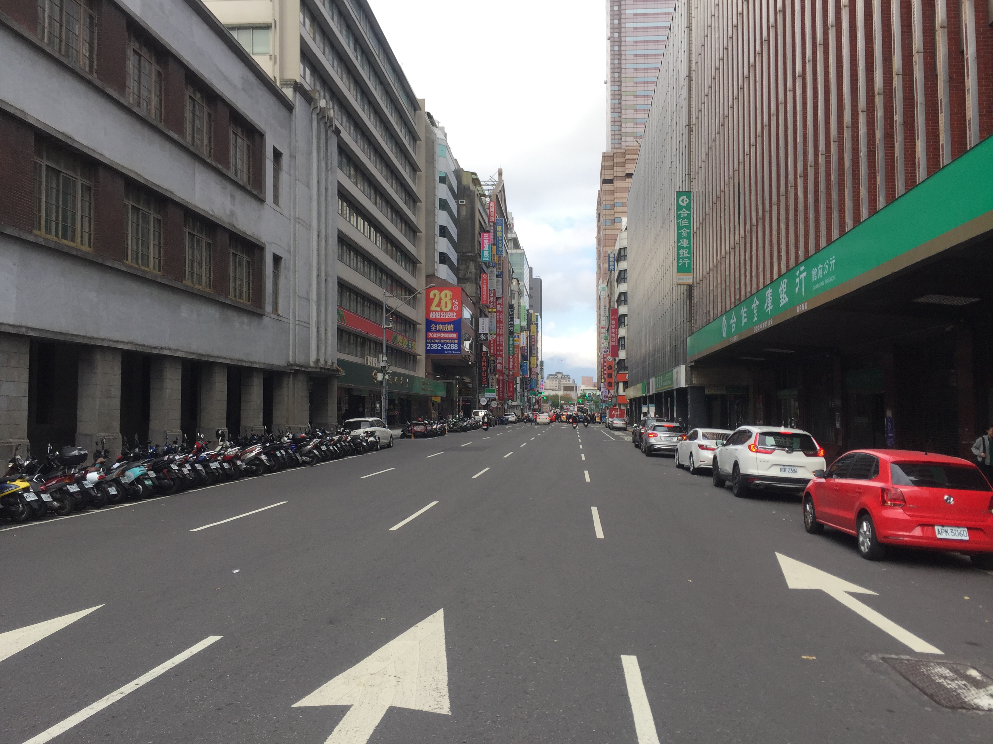 臺北市中正區館前路底（館前斑馬線）